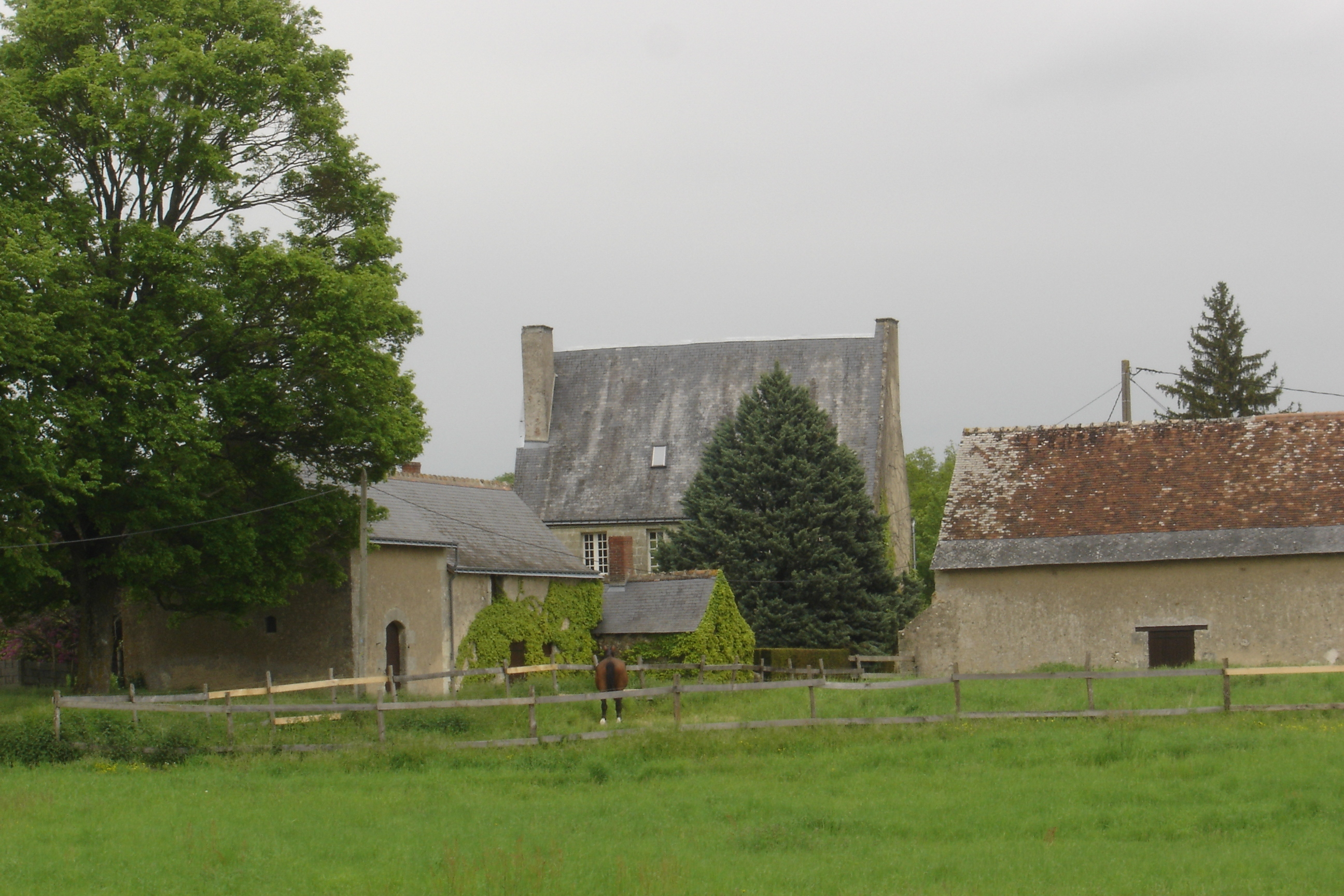 Châtenay, vue générale. Ancienne maison monastique du XVesiècle. Cerelles (37), France.